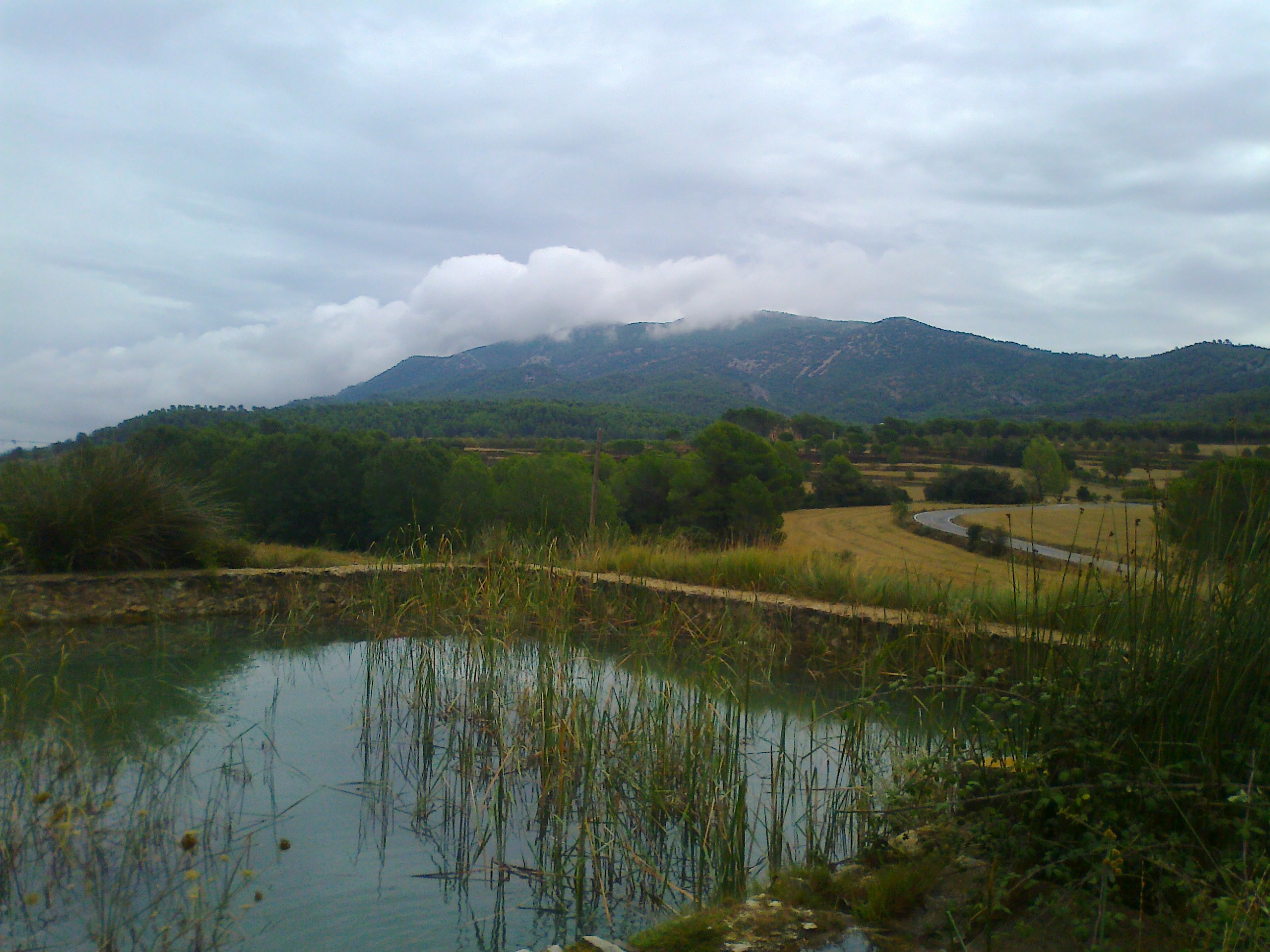 Panoràmica del Vall de Polop, Alcoy (Alacant).